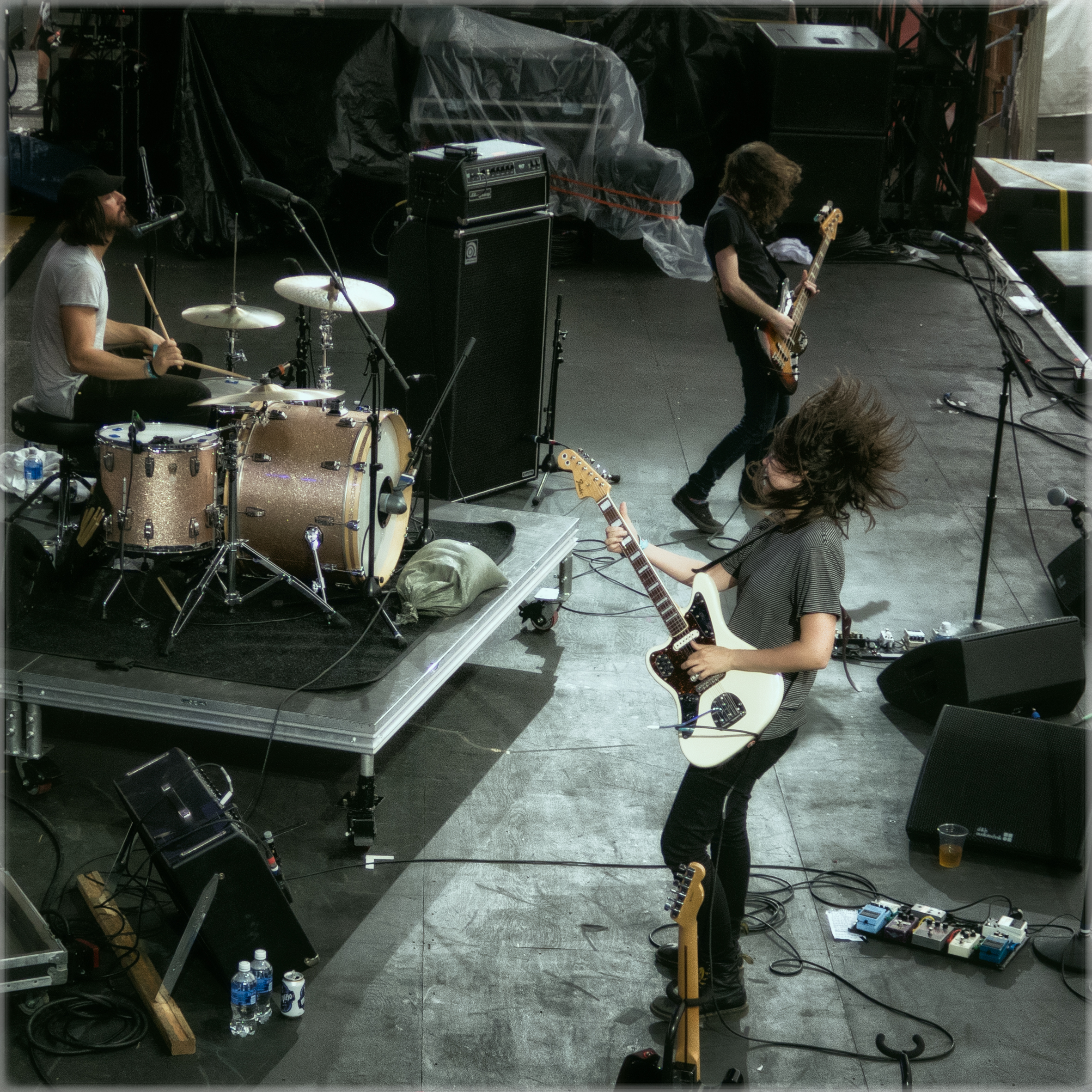 Courtney Barnett at the Sasquatch! Music, in 2015 .